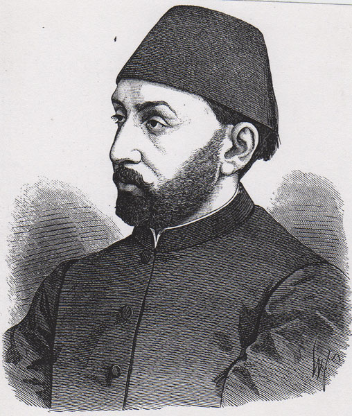 Мурат V (1840-1904), турски султан 1876. Новинска ксилографија око 1880. године